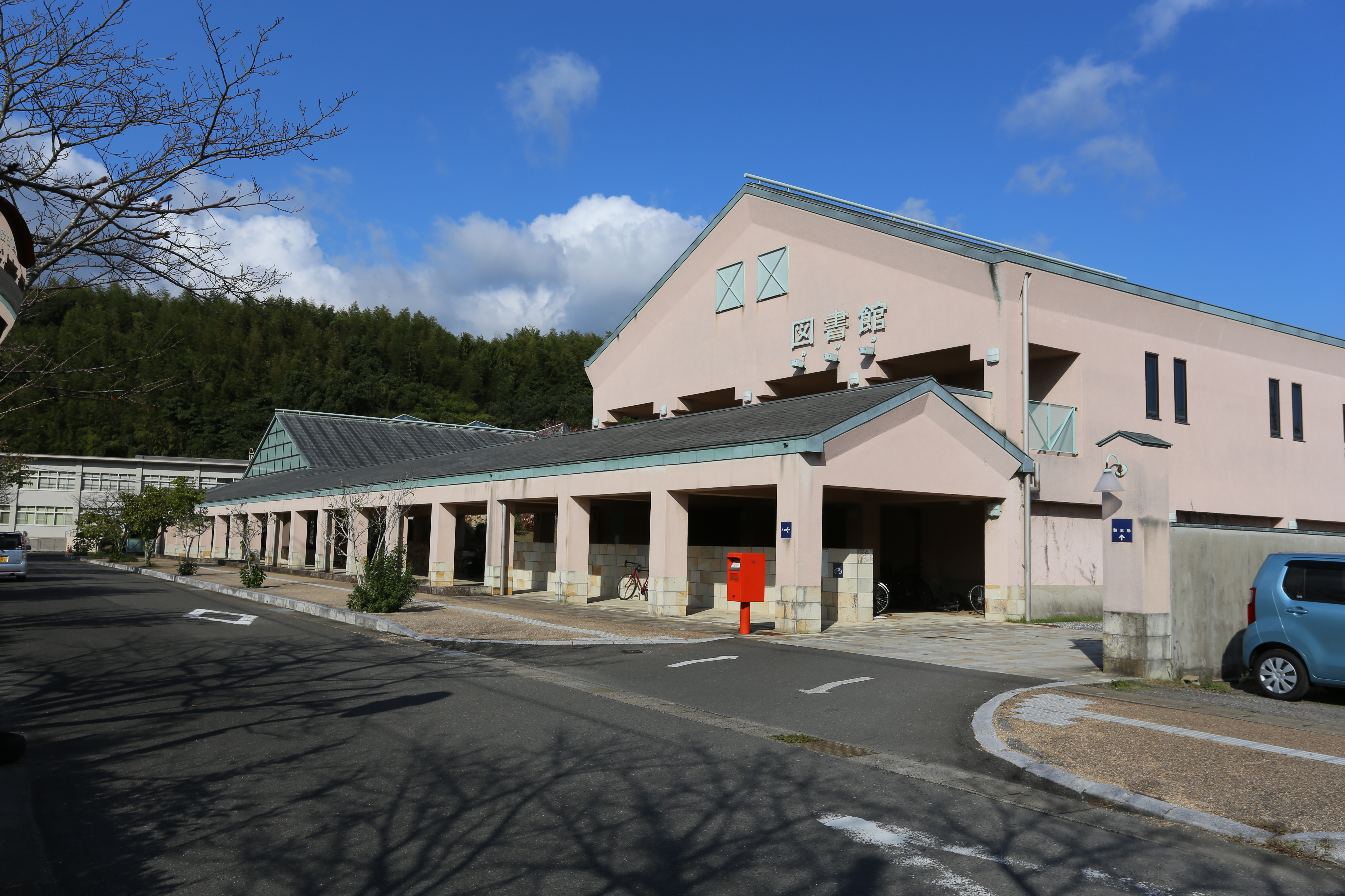 伊万里市民図書館の正面外観